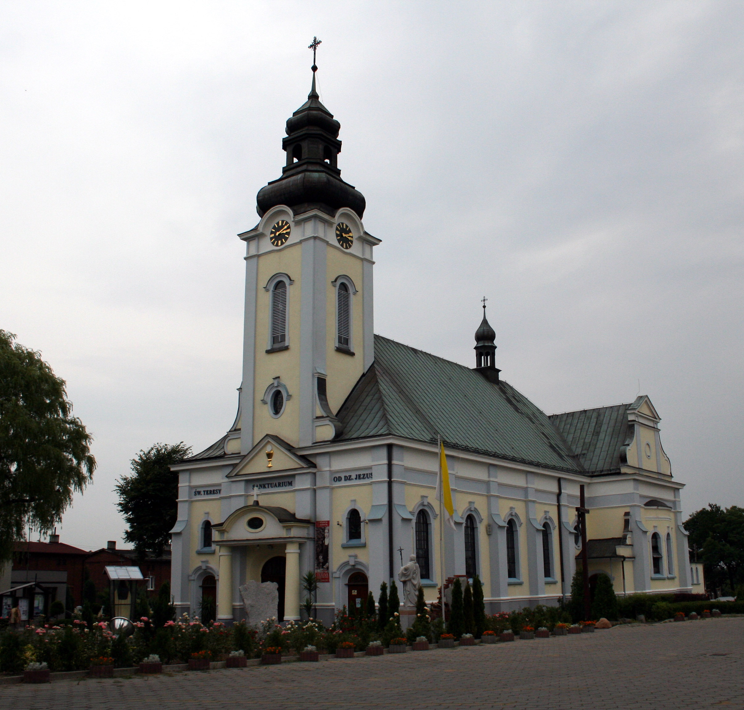 Kościół św. Teresy od Dzieciątka Jezus w Rybniku Chwałowicach